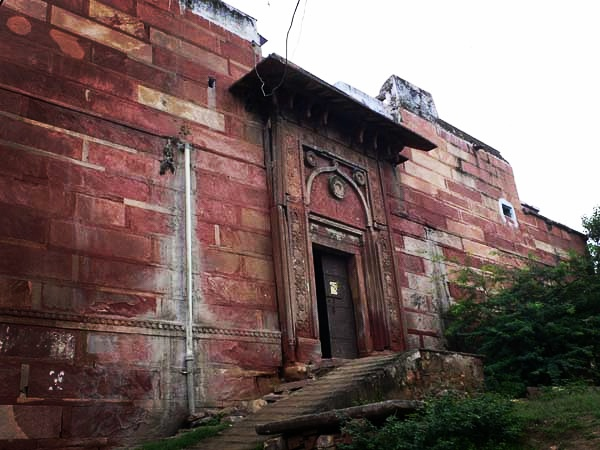 Matiya mahal is a palace in Hindaun city . it founded by matiya namer people